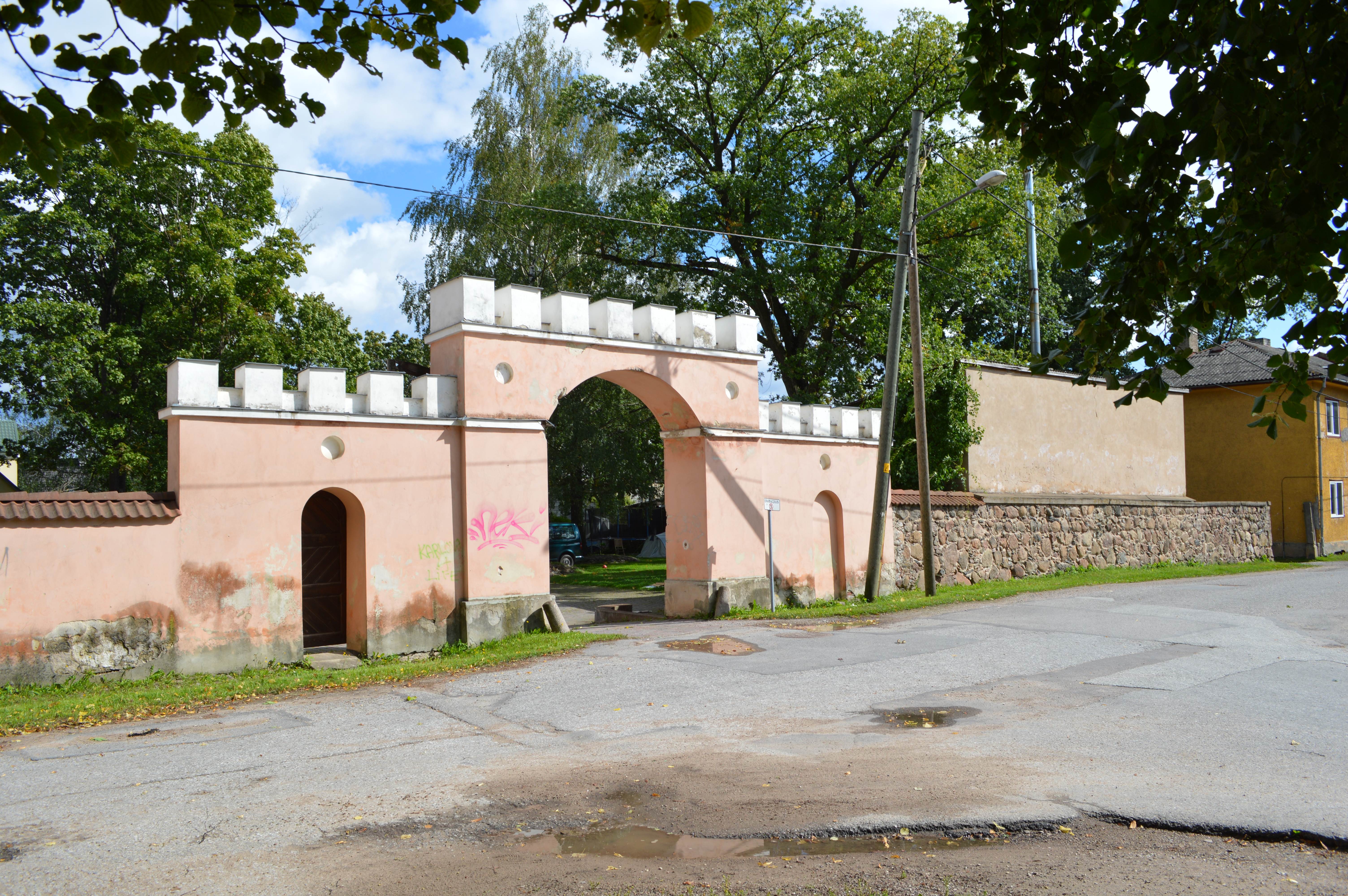 Karlova mõisa värav ja piirdemüür